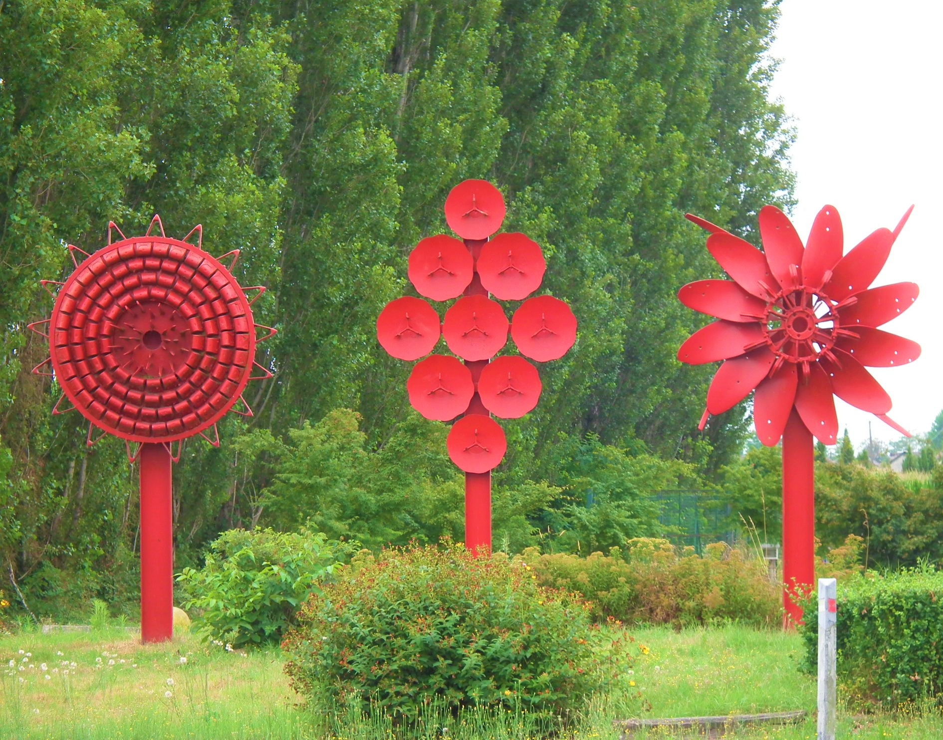 Monumento all'agricoltura posizionato all'ingresso principale del paese di Mandello Vitta